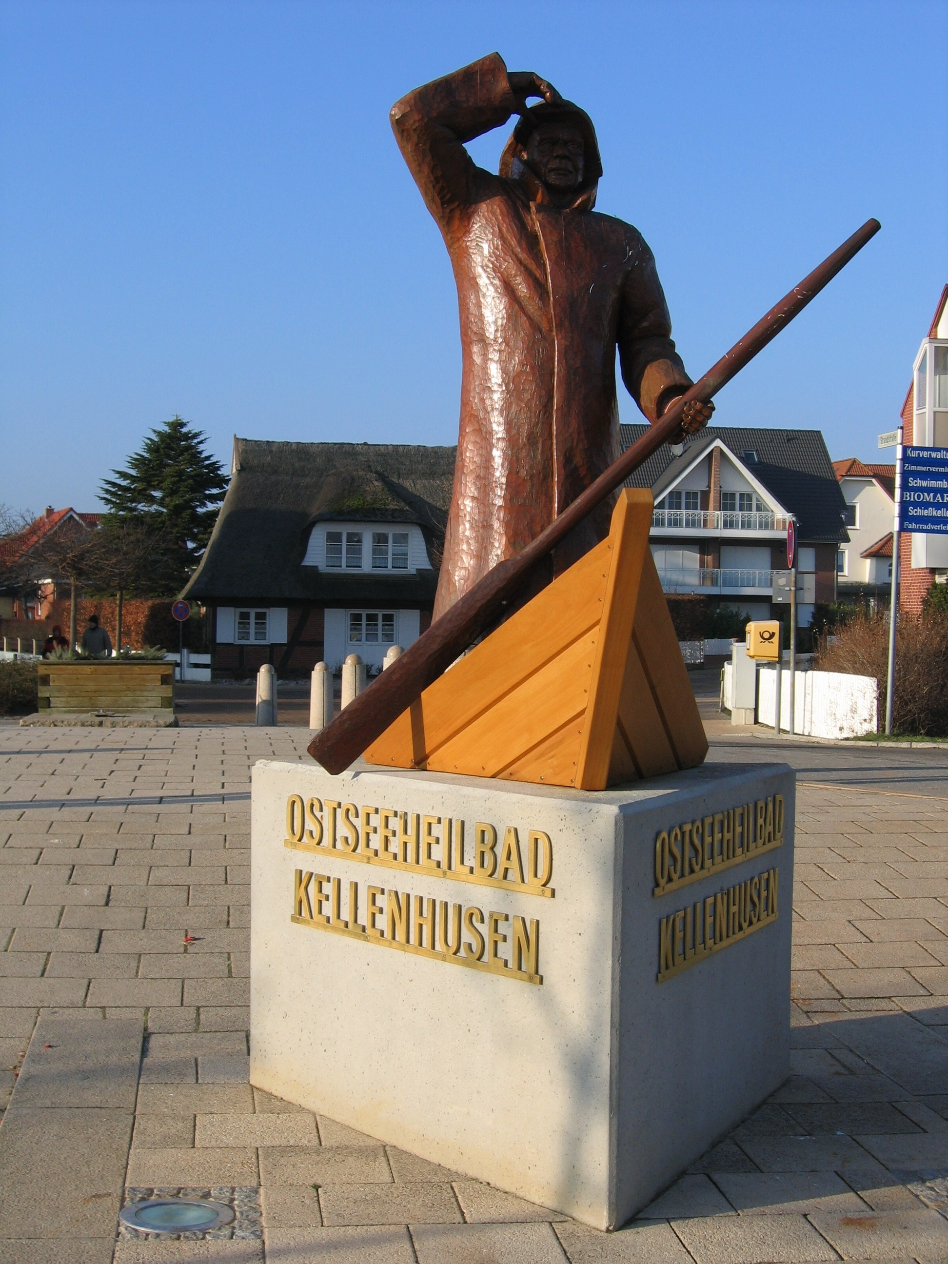 Kellenhusen ,,Fischer, von Holzschnitzer Axel Süphke